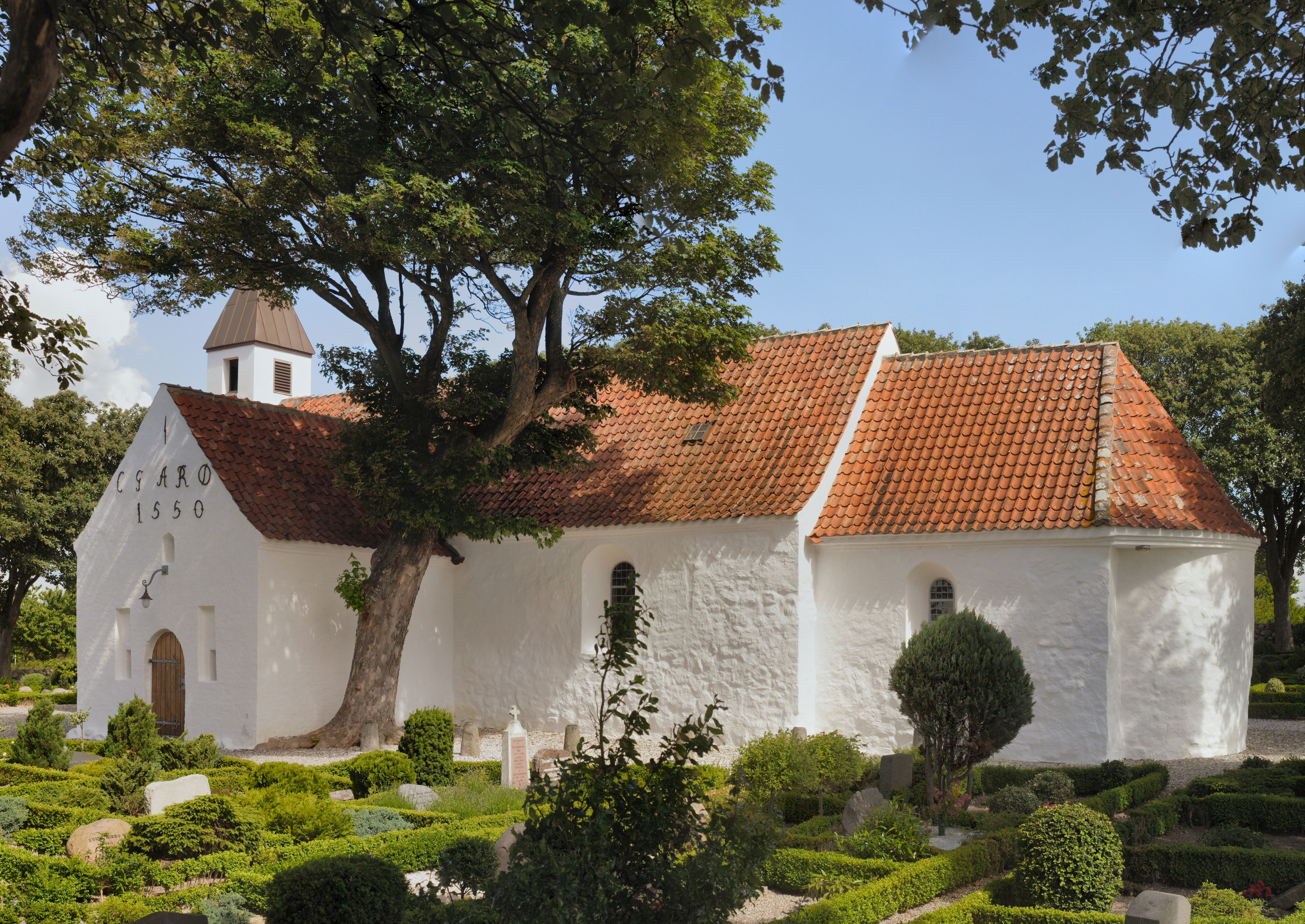 Knebel Kirke